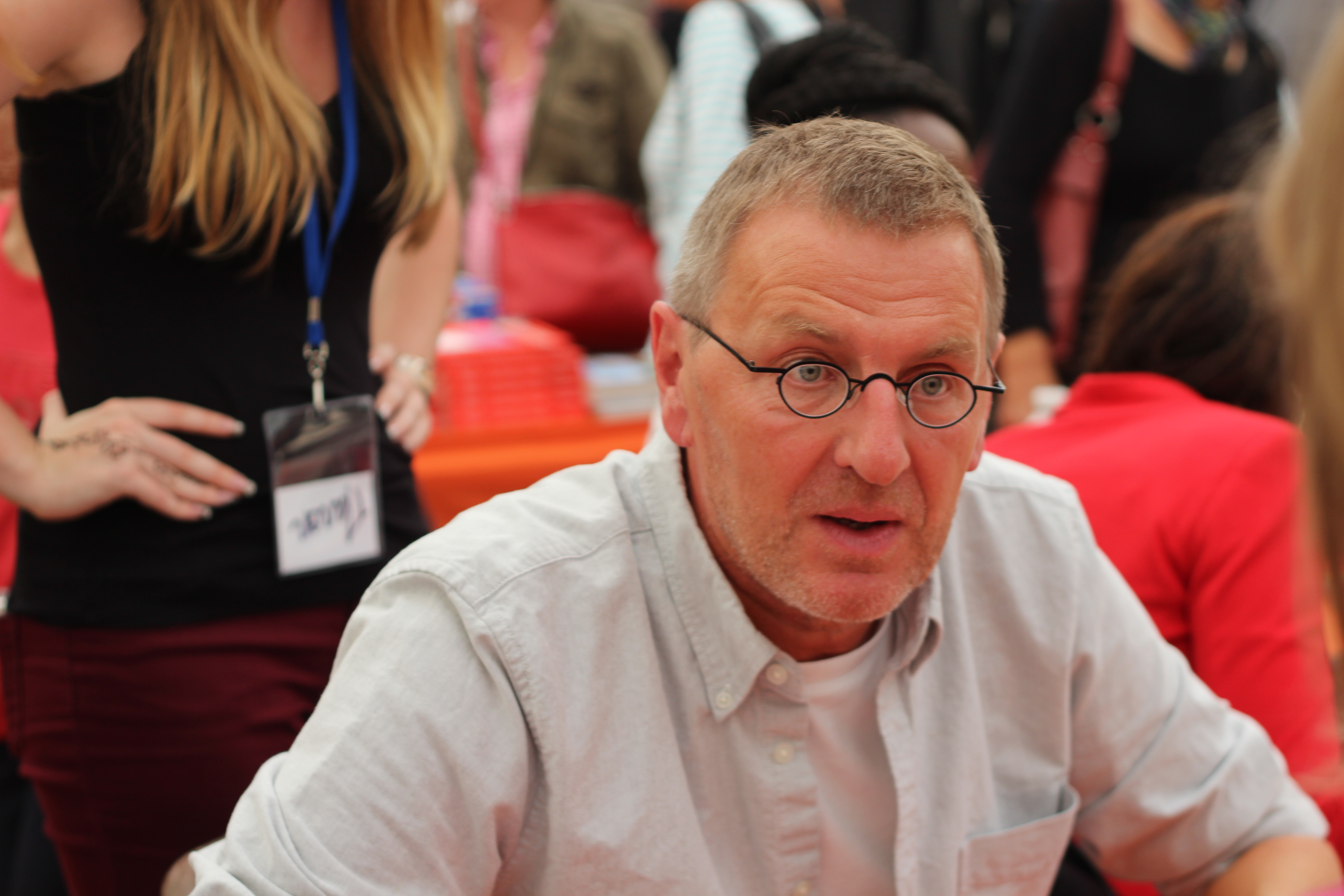 Grégoire Delacourt au Livre sur la Place 2014